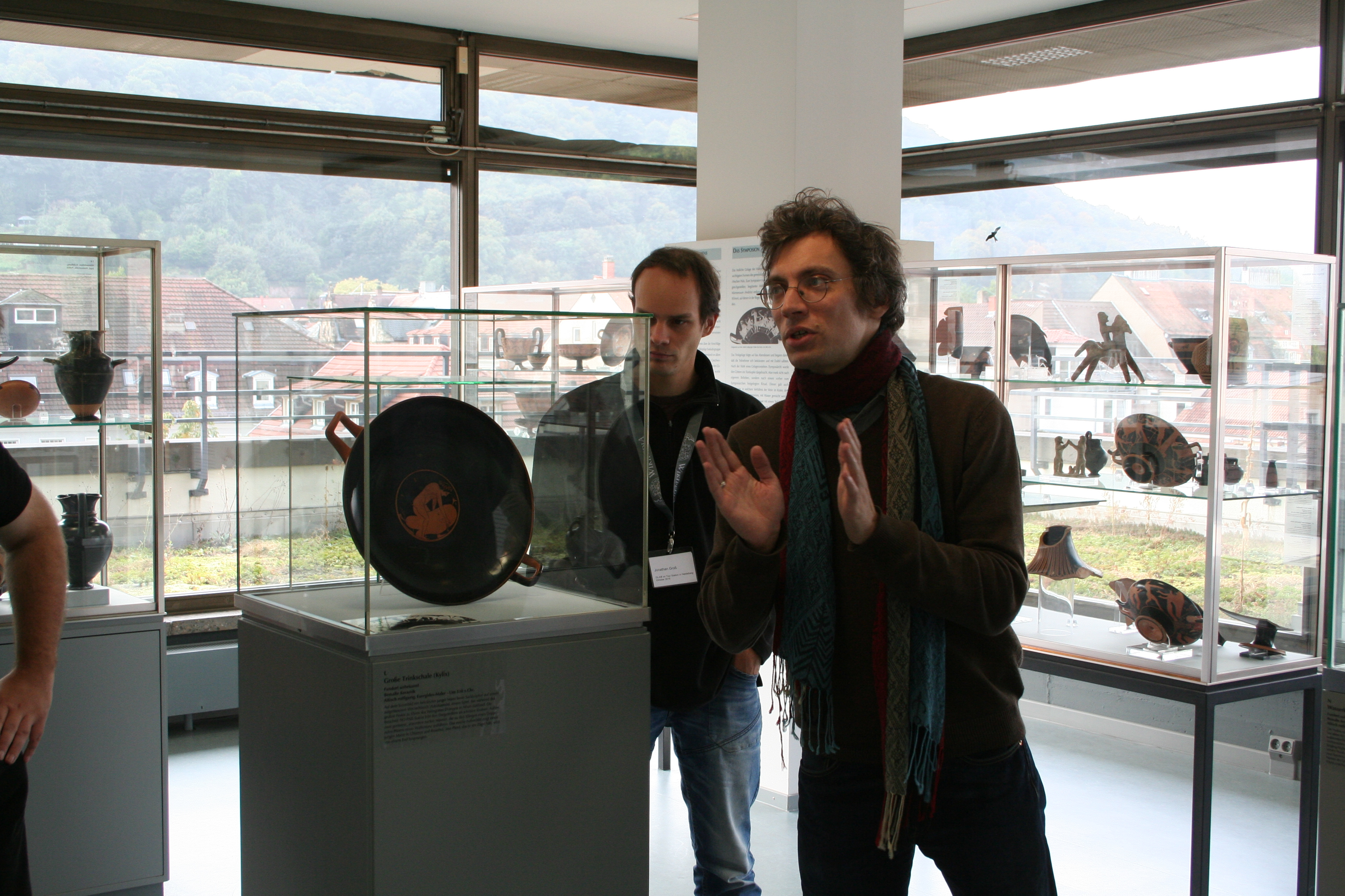 GLAM on Tour Heidelberg 2016